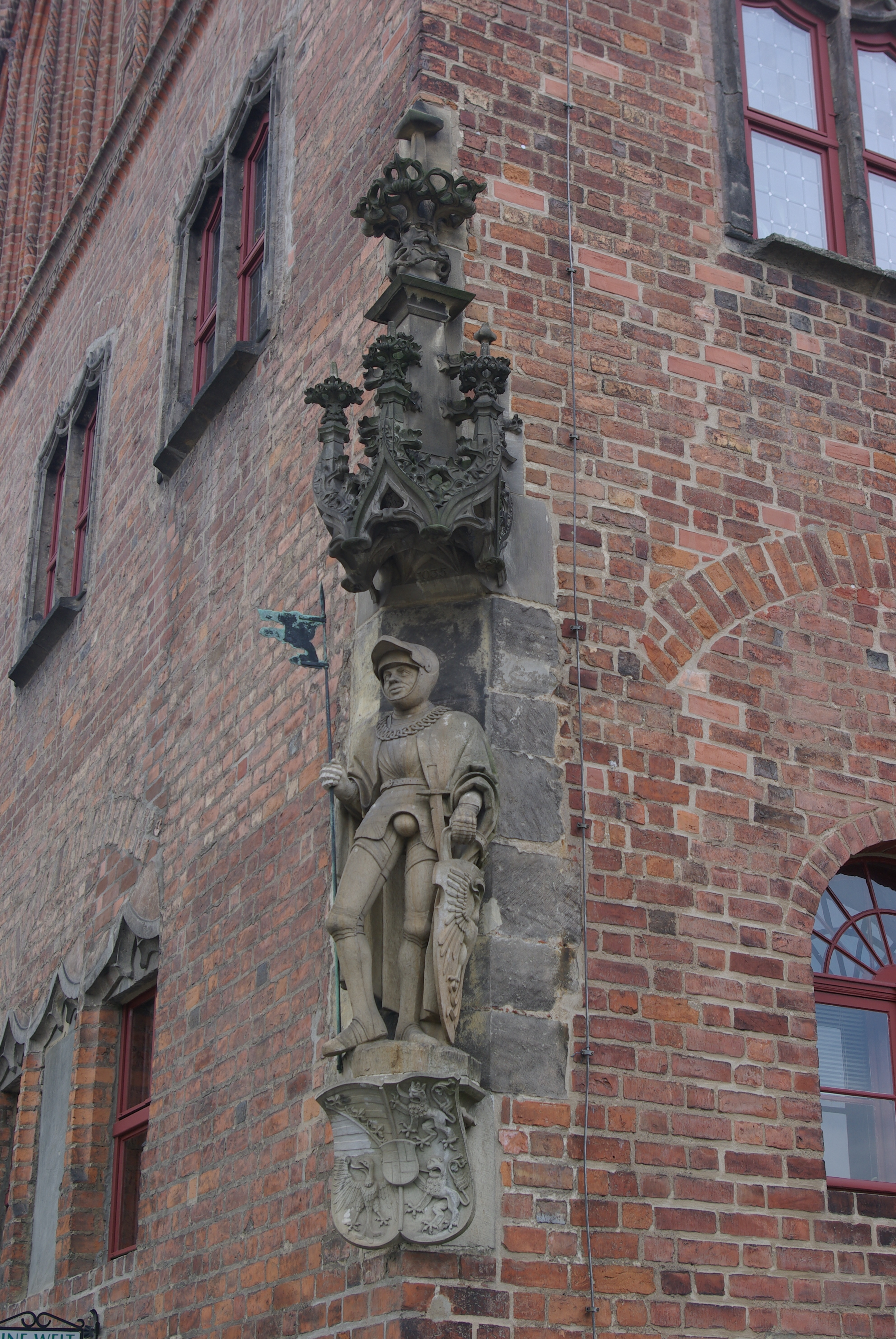 Jüterbog in Brandenburg. Die Figur des Hl. Mauritus befinden sich an der nordöstlichen Ecke des Rathaus von Jüterbog. Die Statue ist um das Jahr 1506 entstanden. am Rathaus befindet sich eine Kopie der Figur, das Original befindet sich im Museum.